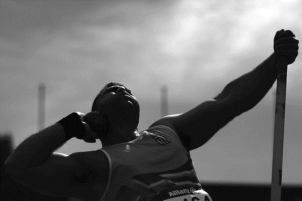 Ilias Nalmpantis